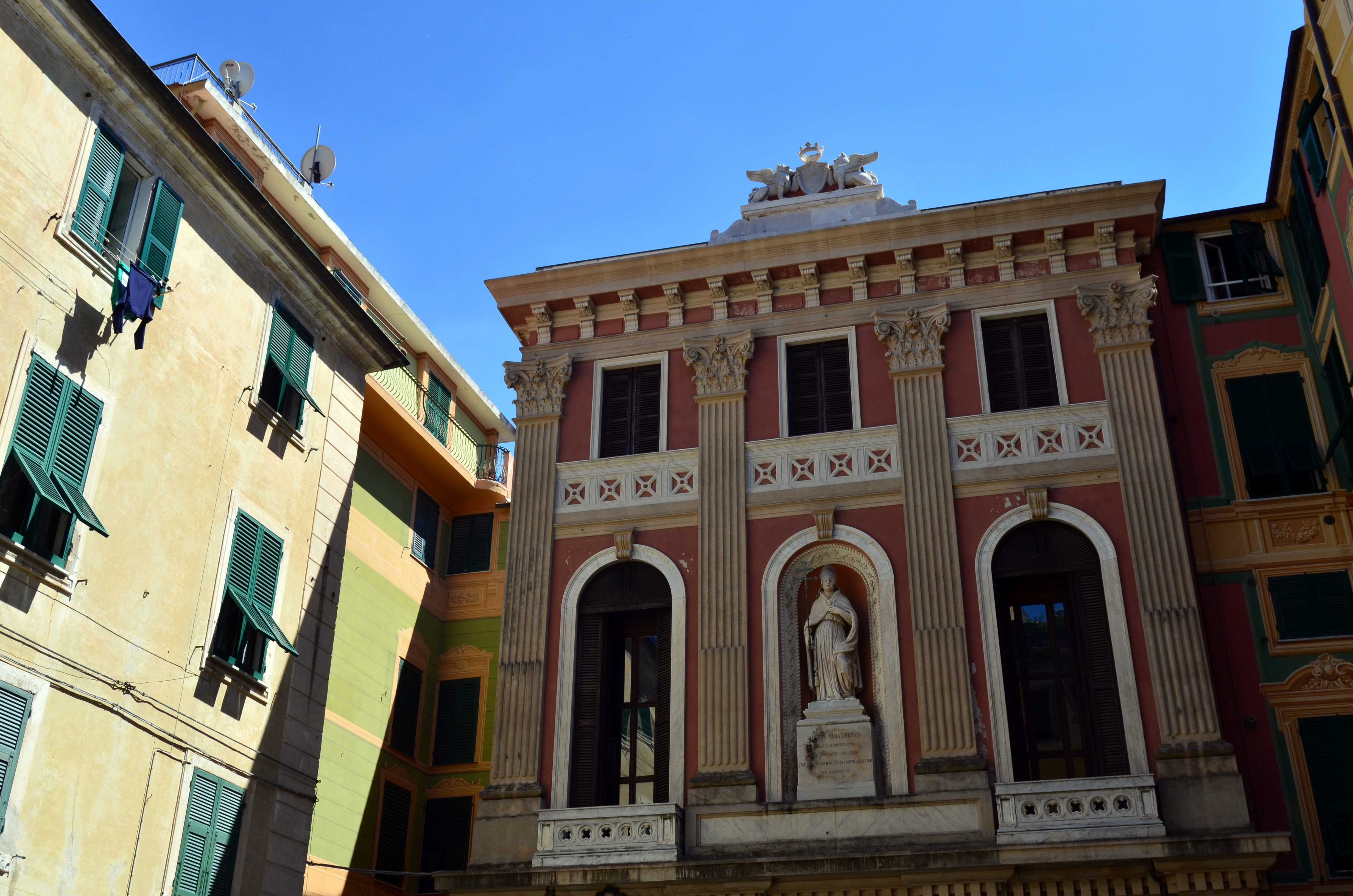 Il palazzo del beato Jacopo da Varazze, già sede del municipio, Varazze, Liguria, Italia